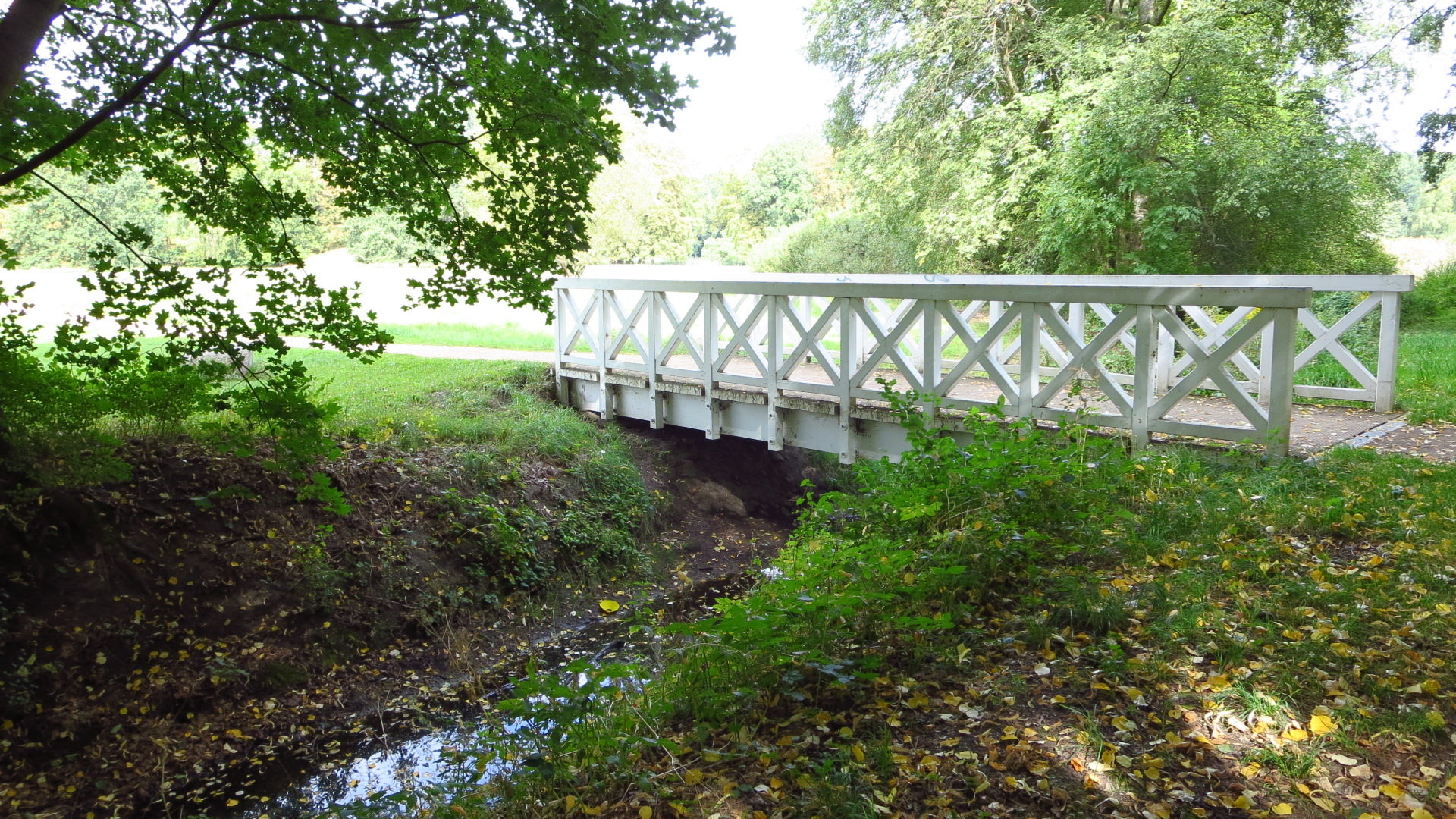 Kleine Brücke, Lennépark, Nr. 7 in der Liste der Baudenkmale in Blumberg bei Ahrensfelde